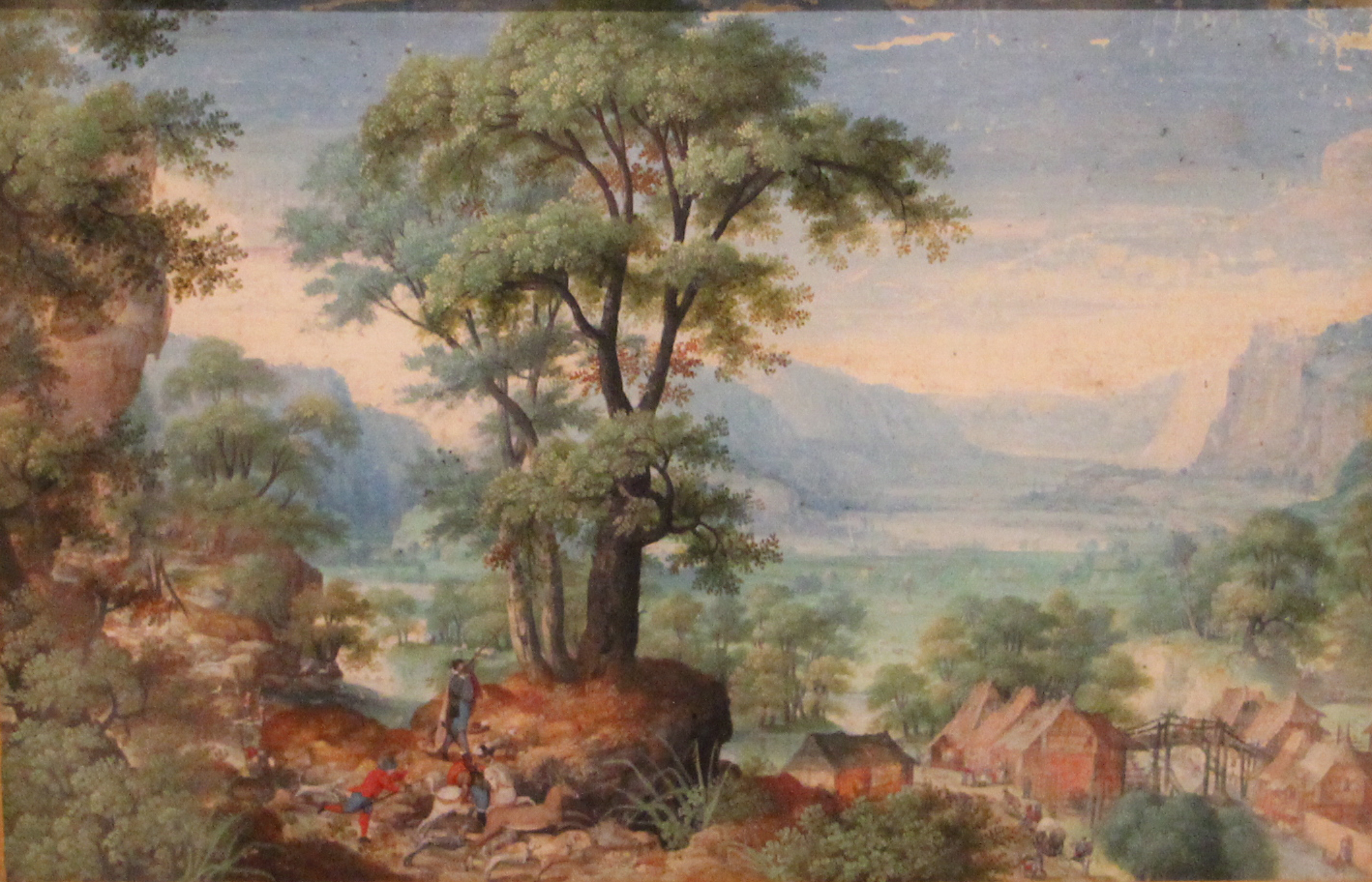 paesaggio con cacciatori